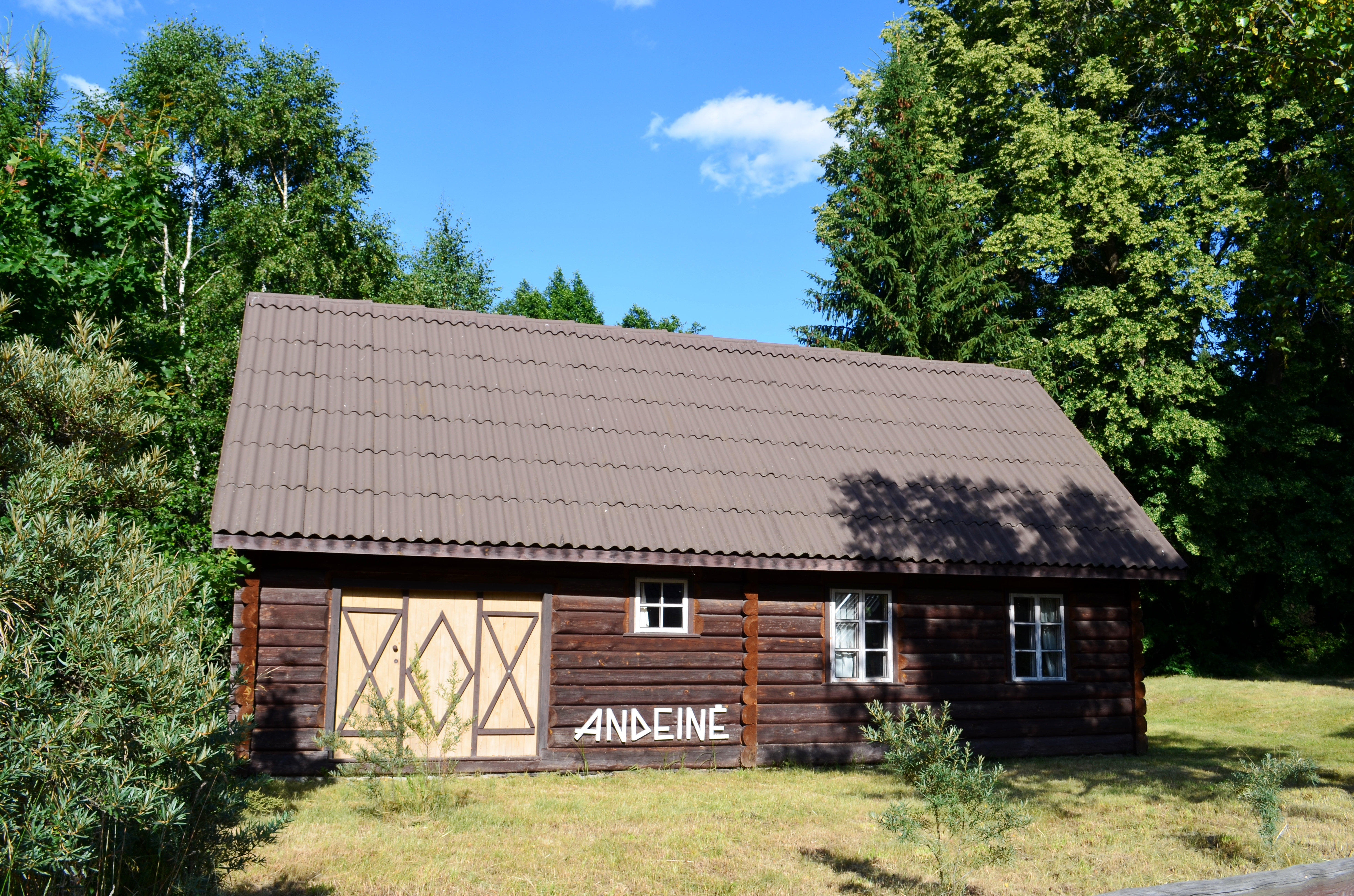 Rudnelė, galerija "Andeinė", Varėnos r.